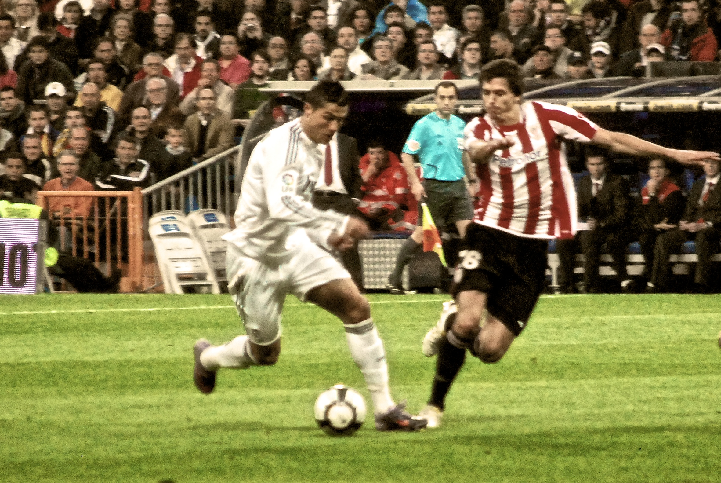 Cristiano